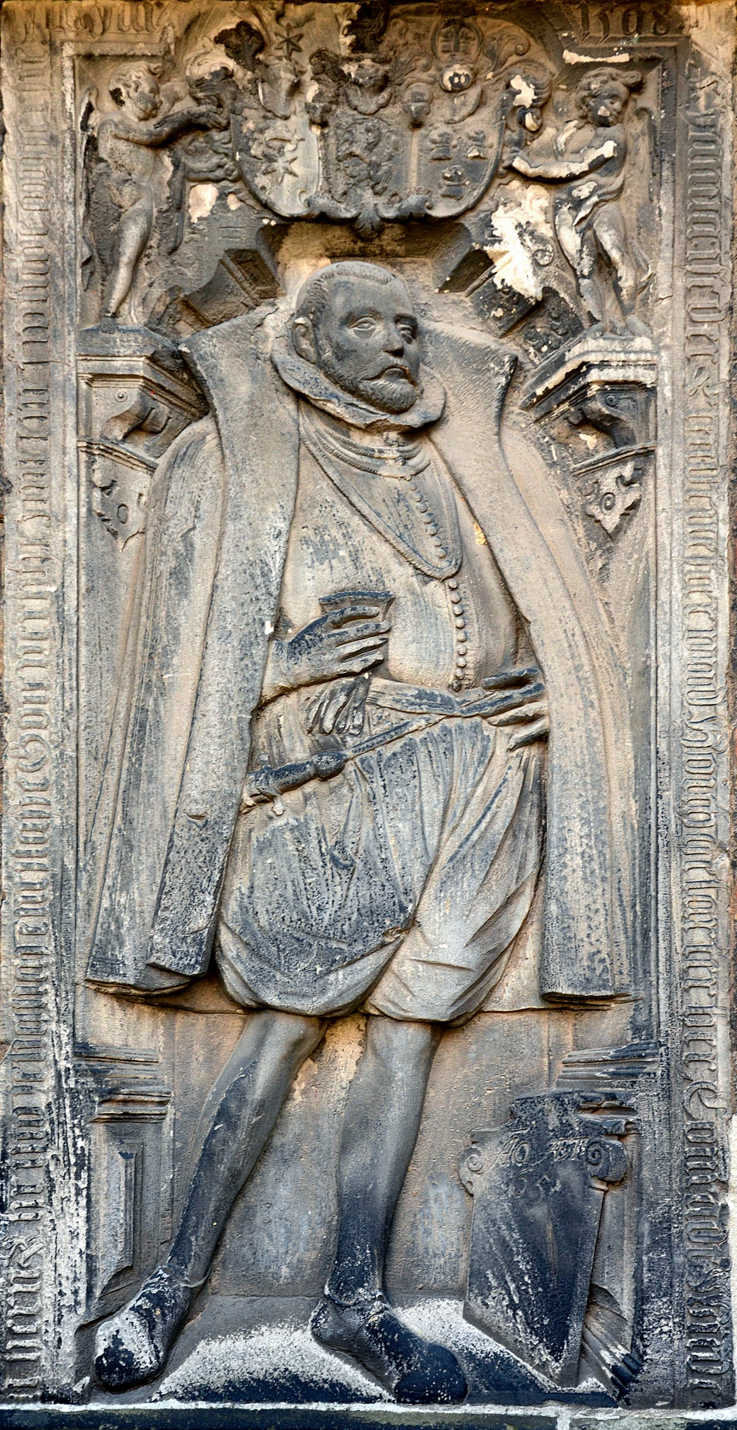 Das 1598 von einem Bildhauer aus der KünstlerfamilieWulff geschaffene Grabmal beziehungsweise der Epitaph des herzoglich braunschweig-lüneburgischen Großvogts Conrad Wiedemeyer (1533-1598) an der Nordwand der Marktkirche in Hannover ...